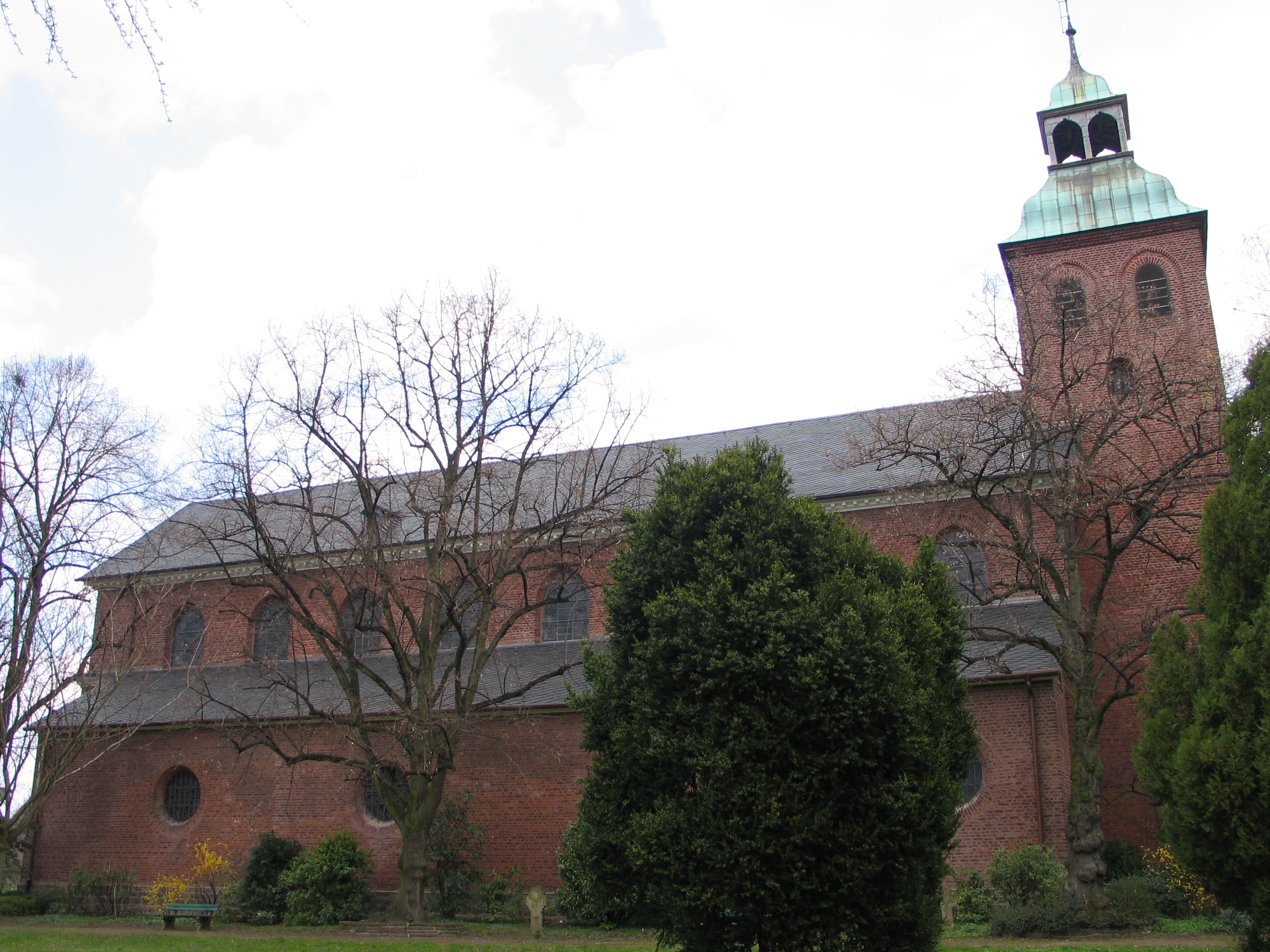 Kath. Pfarrkirche St. Remigius zu Sürth. Der Glockenturm ist das Wahrzeichen des Dorfes. This is a photograph of an architectural monument.